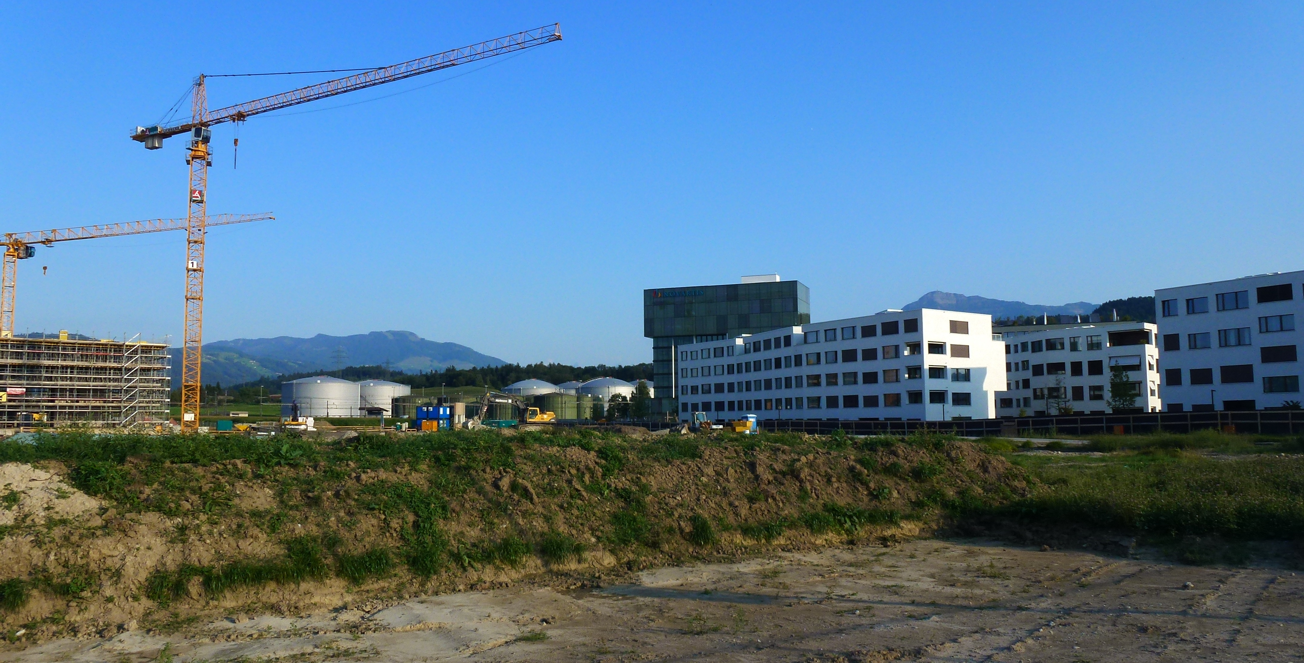 Suurstoffi, Rotkreuz